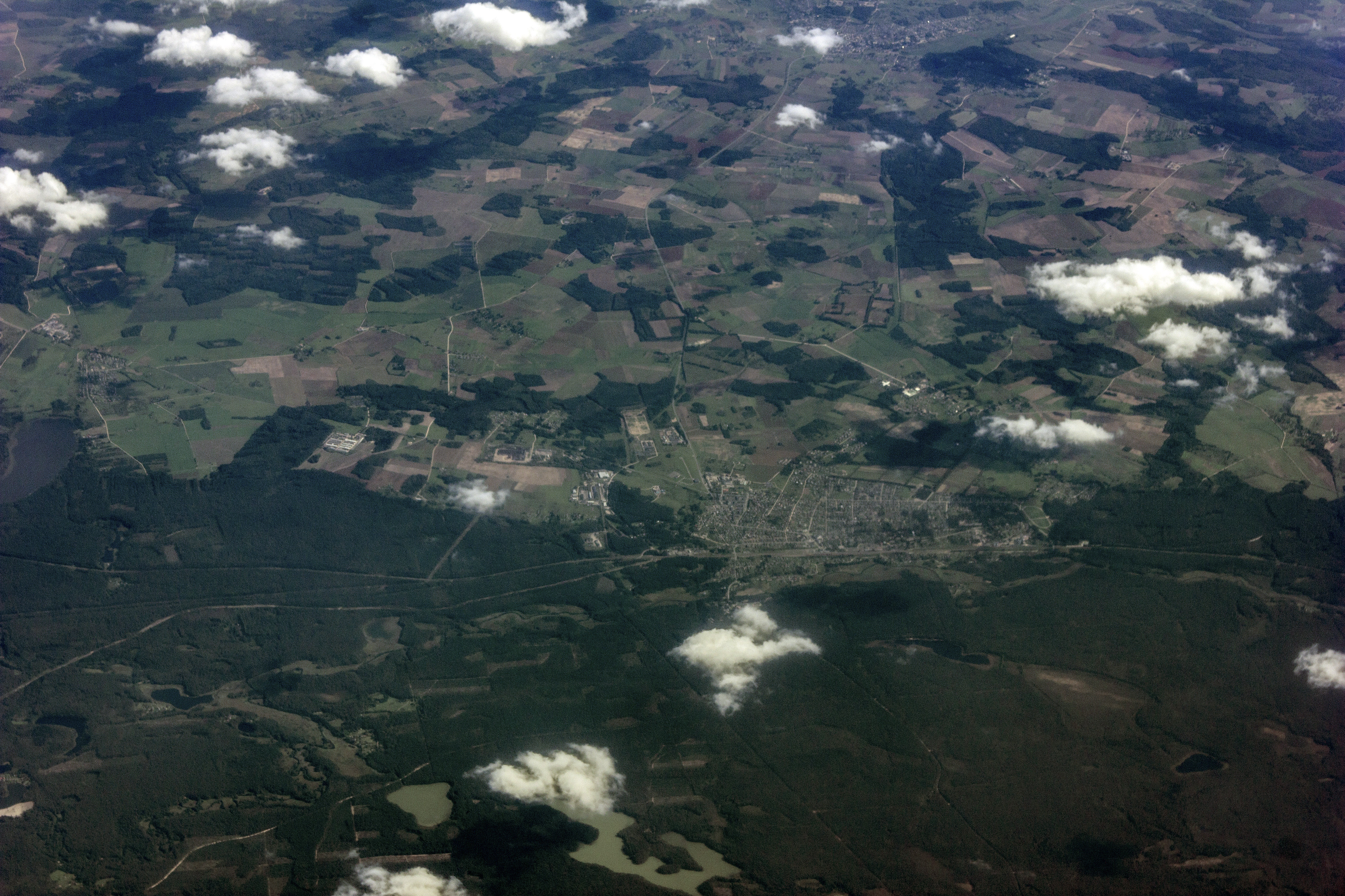 Вид с самолёта на город Швенчёнеляй, Литва